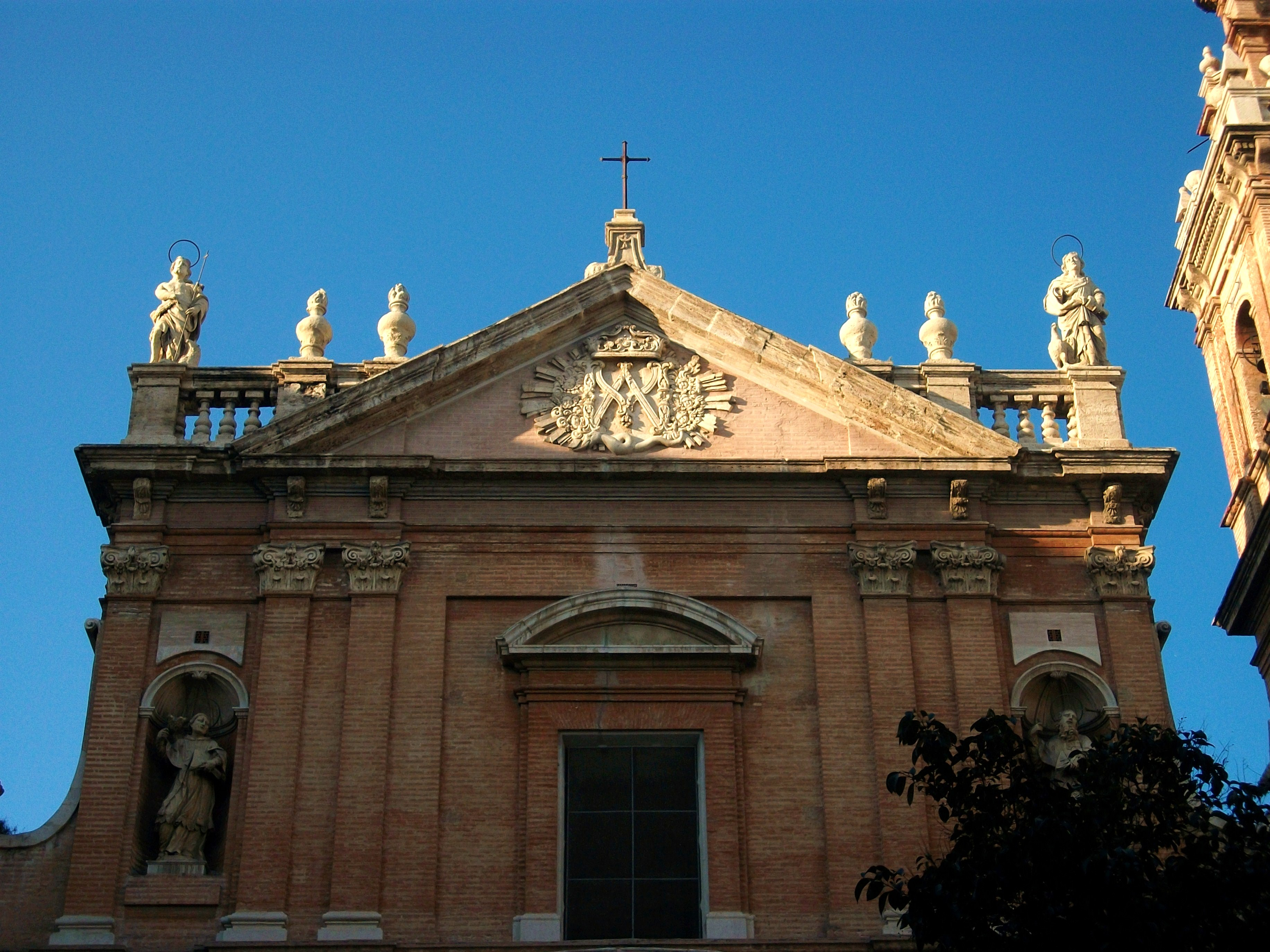 Part superior de la façana de l'església de sant Tomàs i sant Felip Neri de València.